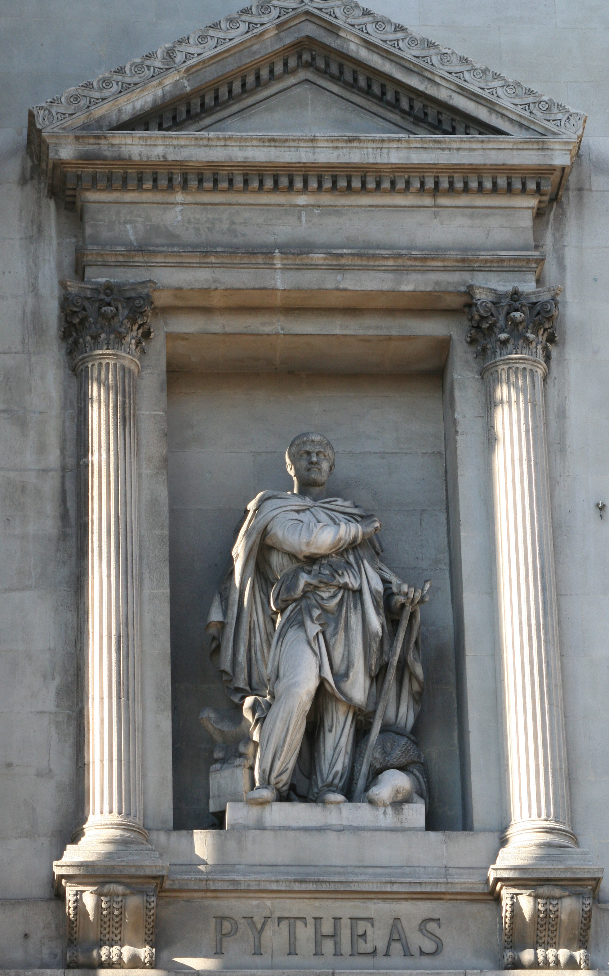 Statue de Pythéas réalisée par Auguste Ottin (1811-1890) et placée sur la façade du palais de la Bourse à Marseille.